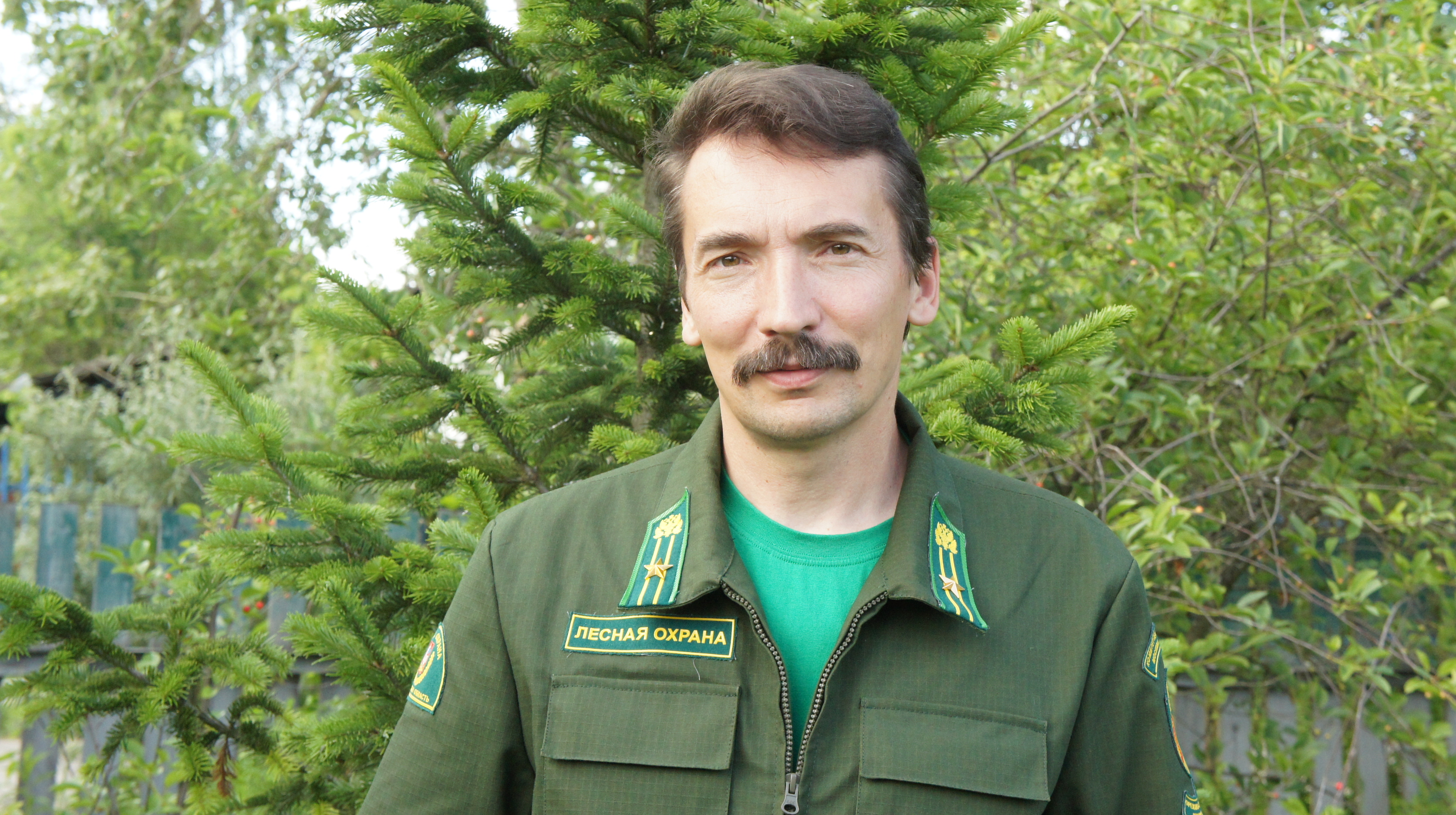 Старший участковый лесничий Московской области в летней повседневной форме. На фото В.П. Захаров.